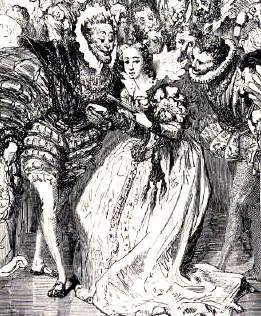 Illustration for Charles Perrault's Cinderella from Histoires ou Contes du Temps passé: Les Contes de ma Mère l'Oye(1697). Gustave Doré's illustrations appear in an 1867 edition entitled Les Contes de Perrault. Second of three engravings